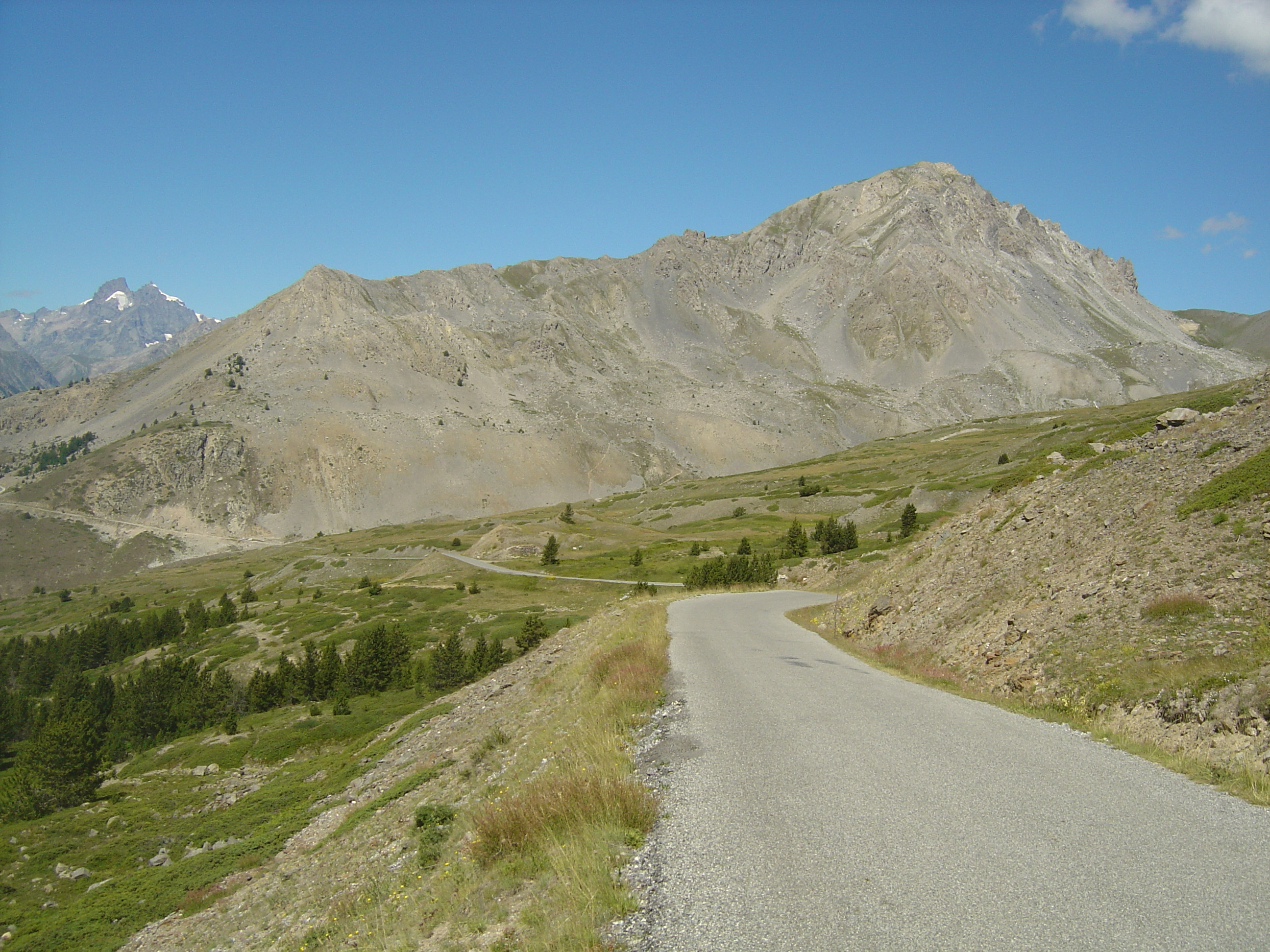 Route du col de Granon. Vue sur le sommt du Grand Aréa (2869m) dans les derniers kilomètres d'ascension.